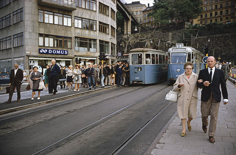 Spårvagnar på Katarinavägen dagen före högertrafikomläggningen 1967.